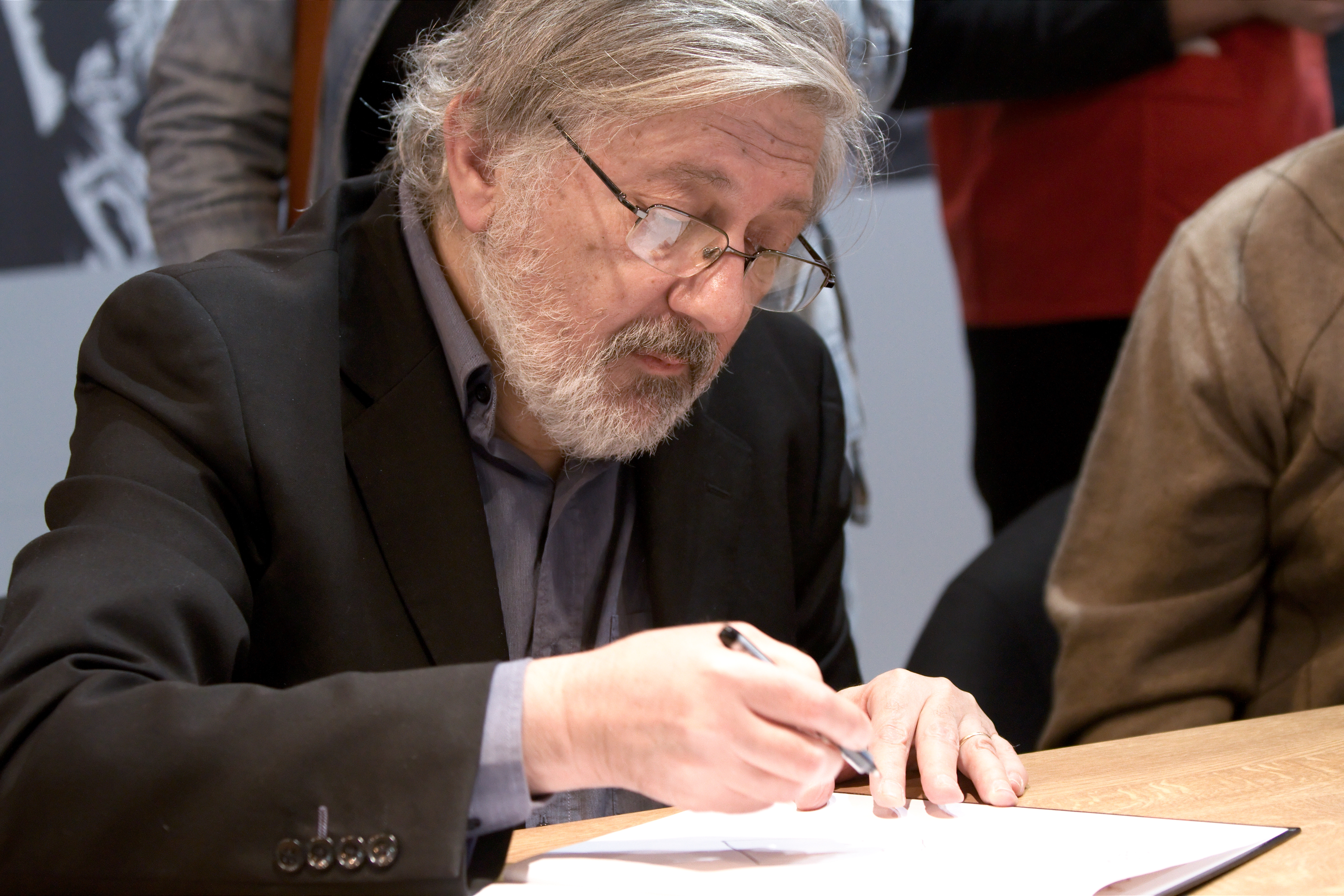 Jacques Tardi en dédicace au Salon du livre de Paris.